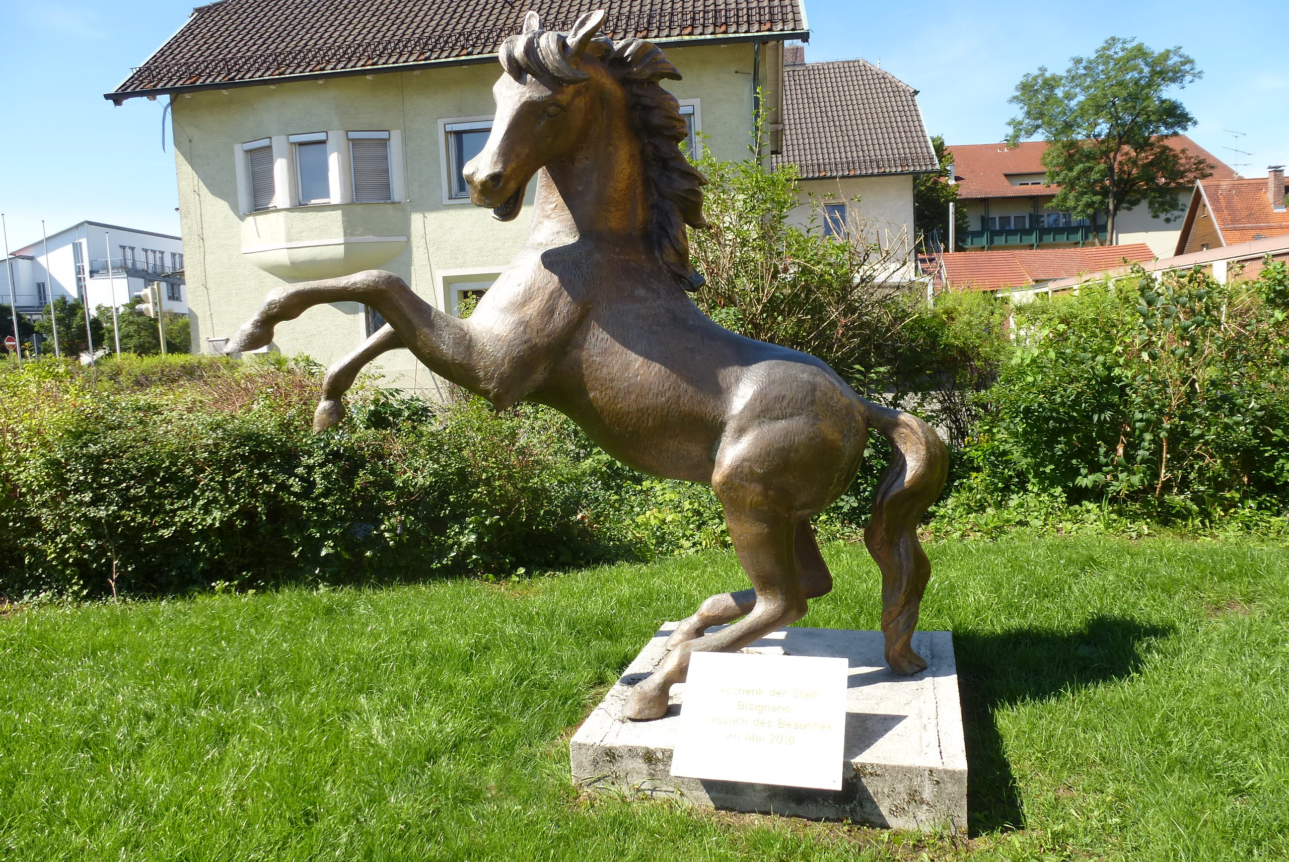 Feldkirchen bei München, Ortspartnerschaft, Bronze-Pferd aus Bisignano (Italien)